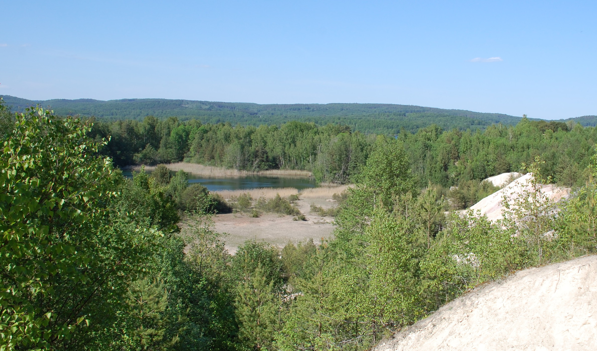 ehemaliger Tagebau am Ivö Klack an der Nordspitze Ivös